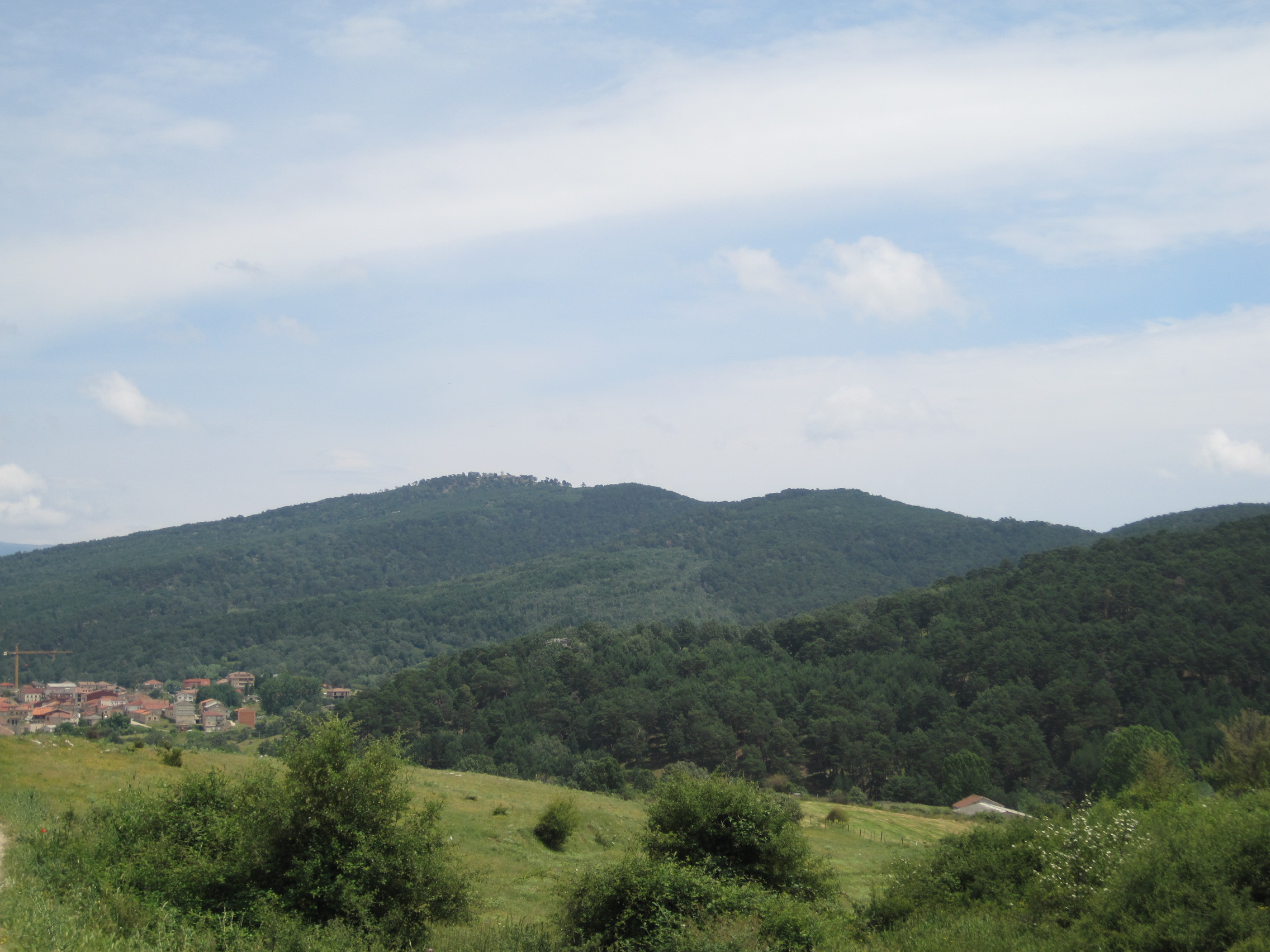 Vista del monte Araña, junto a Canicosa de la Sierra (Burgos, España).